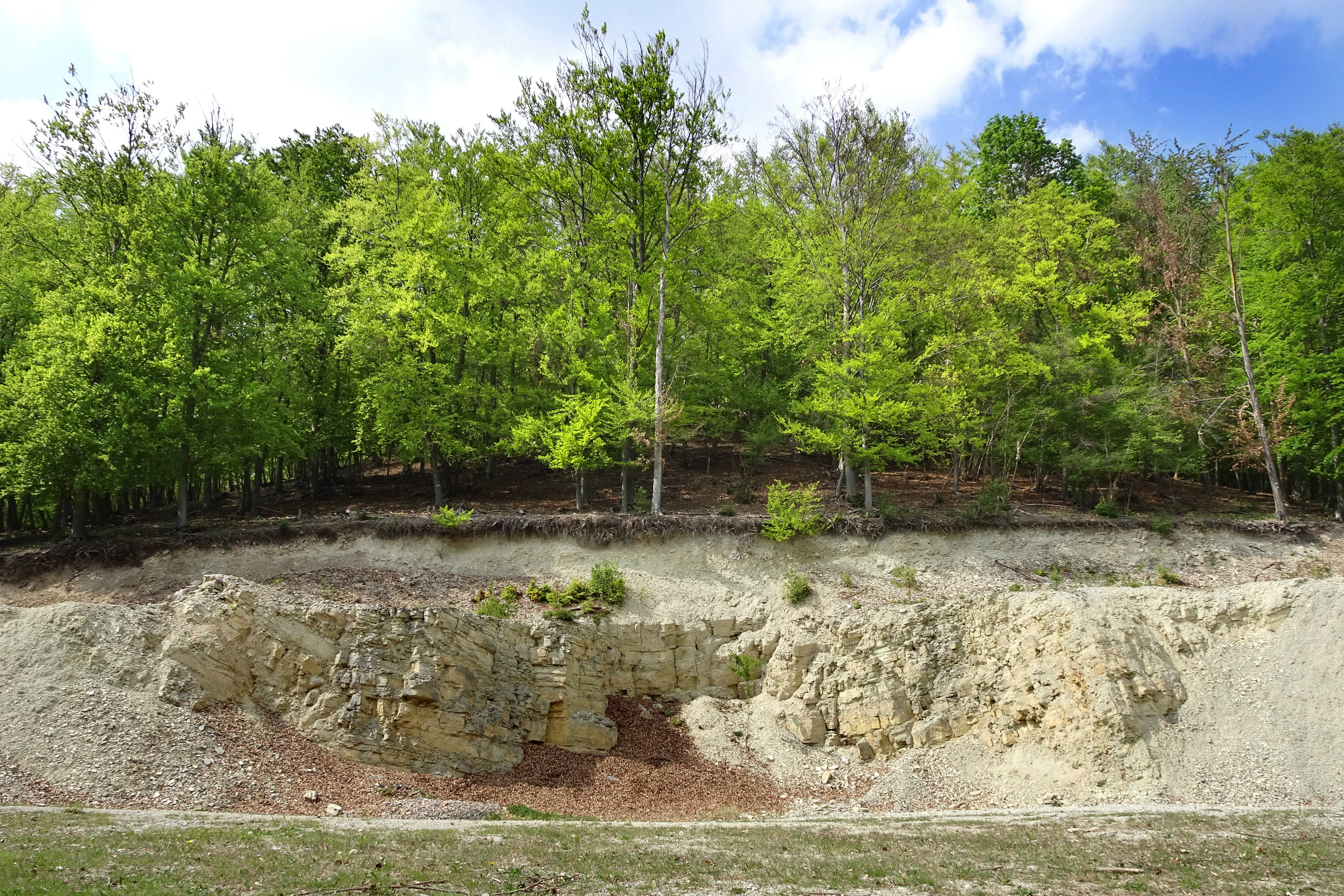 Der Trimberg bei Reichensachsen ist eine Bergkuppe im nordhessischen Werra-Meißner-Kreis, die sich mit einer Höhe von 332,6 m westlich und nördlich des Tals der Wehre erhebt. Die Vegetation besteht aus artenreichen Buchenwäldern, die in großen Teilen aus einer ehemaligen Niederwaldbewirtschaftung hervorgegangen sind. Um die im Gebiet des Trimberges lebenden seltenen Tierarten und die hier vorkommenden gefährdeten Pflanzenarten einschließlich ihrer Lebensräume und Standorte zu schützen wurde der Bereich im Dezember 1993 zum Naturschutzgebiet erklärt und später an die EU-Kommission als Flora-Fauna-Habitat-Gebiet für das länderübergreifende Schutzgebietssystems Natura 2000 gemeldet. Das Schutzgebiet liegt westlich des Ortsteils Reichensachsen und nördlich des Ortsteils Oetmannshausen der Gemeinde Wehretal.